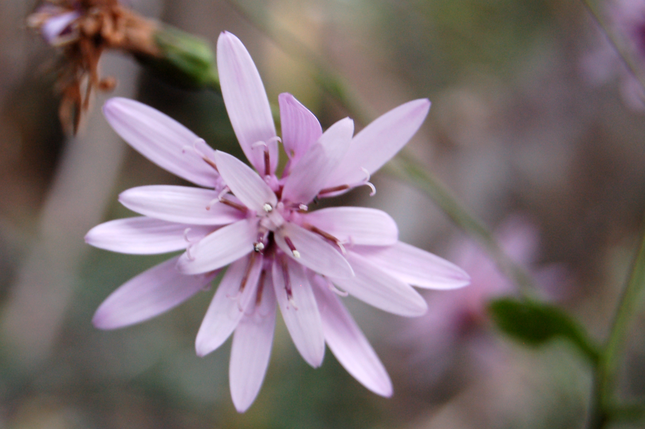 Flor de Calorezia Nutans